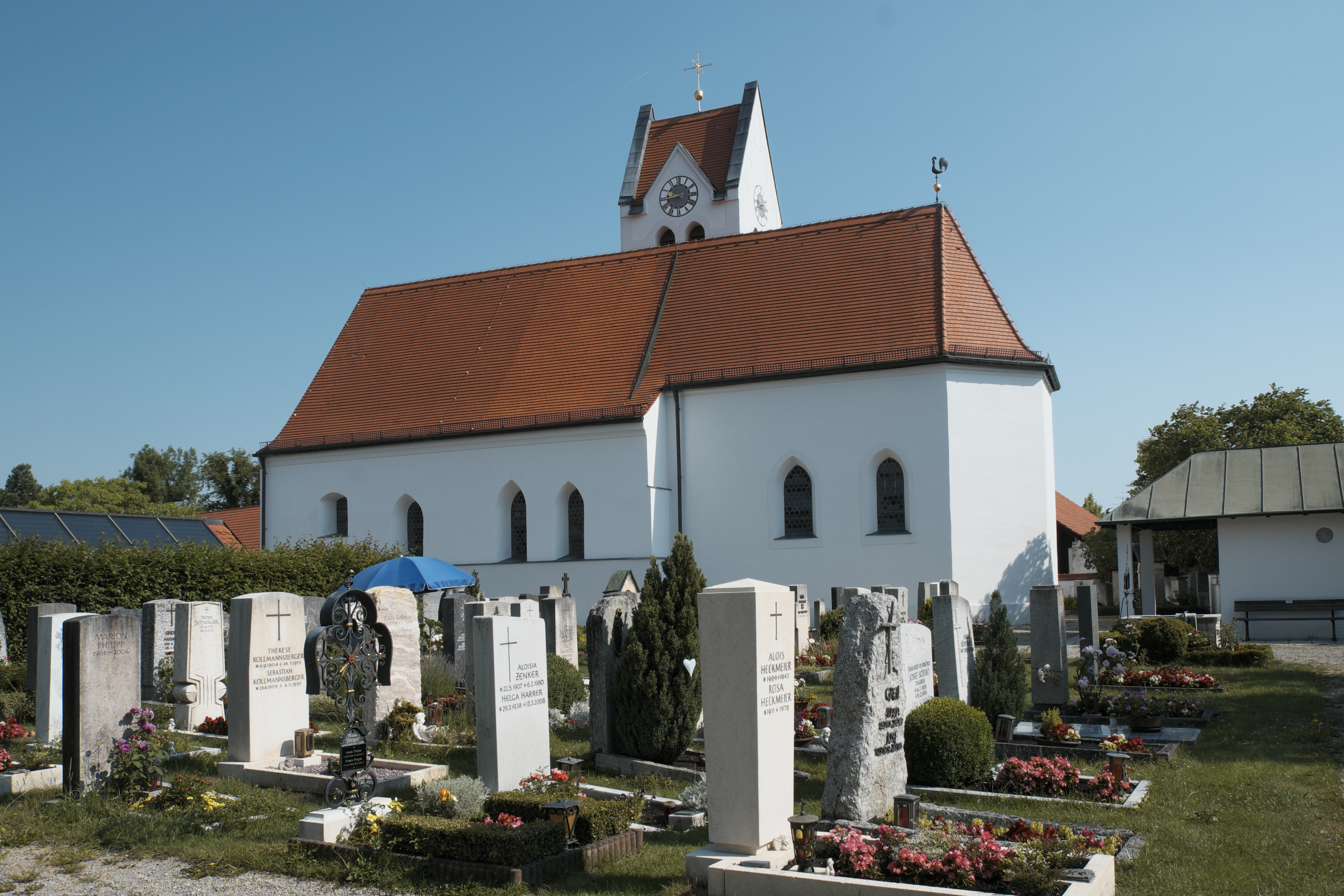 Alte katholische Pfarrkirche St. Nikolaus in Neuried (bei München) im Landkreis München (Bayern, Deutschland)